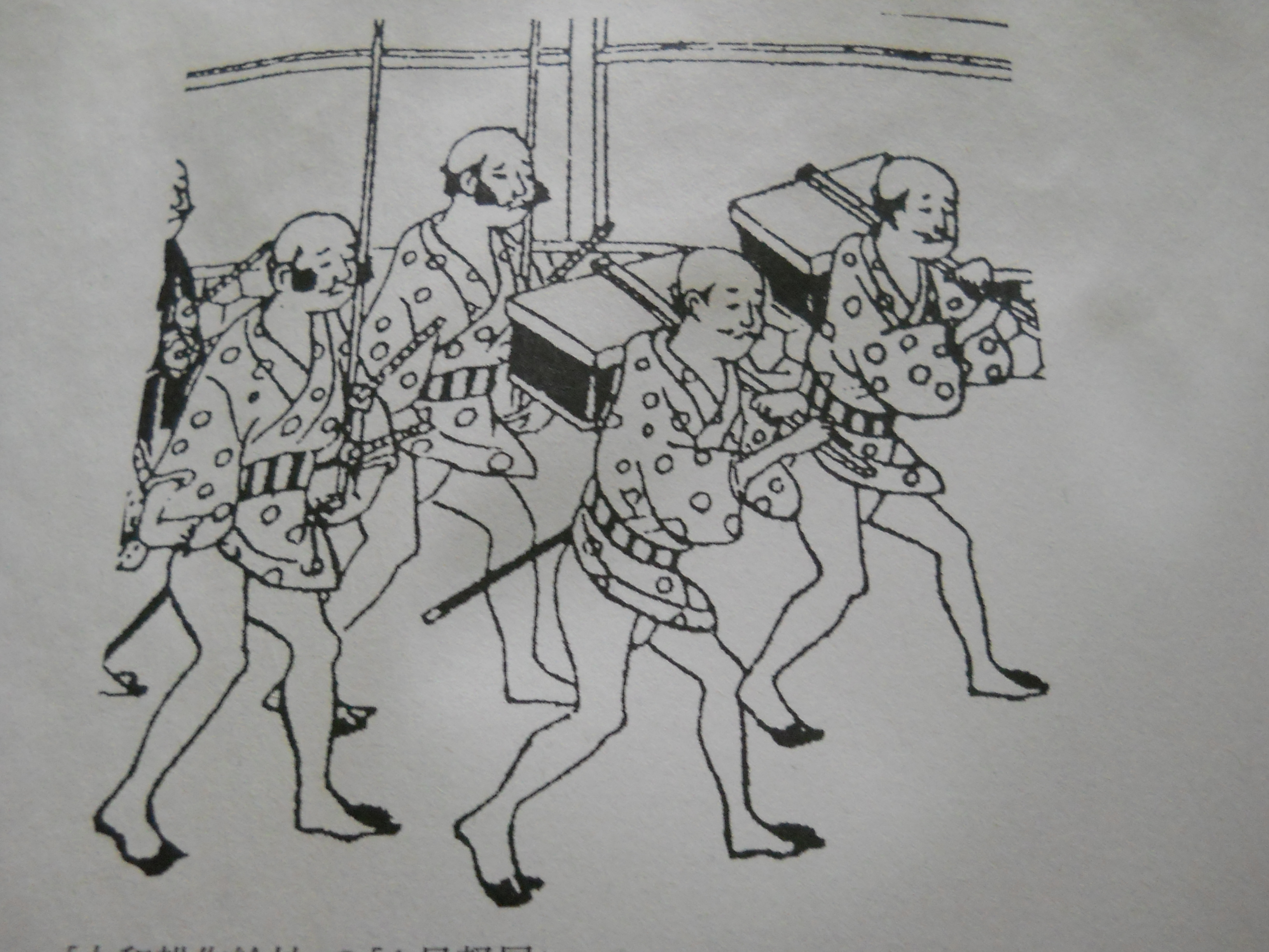 Ａｓｈｉｇａｌｕ